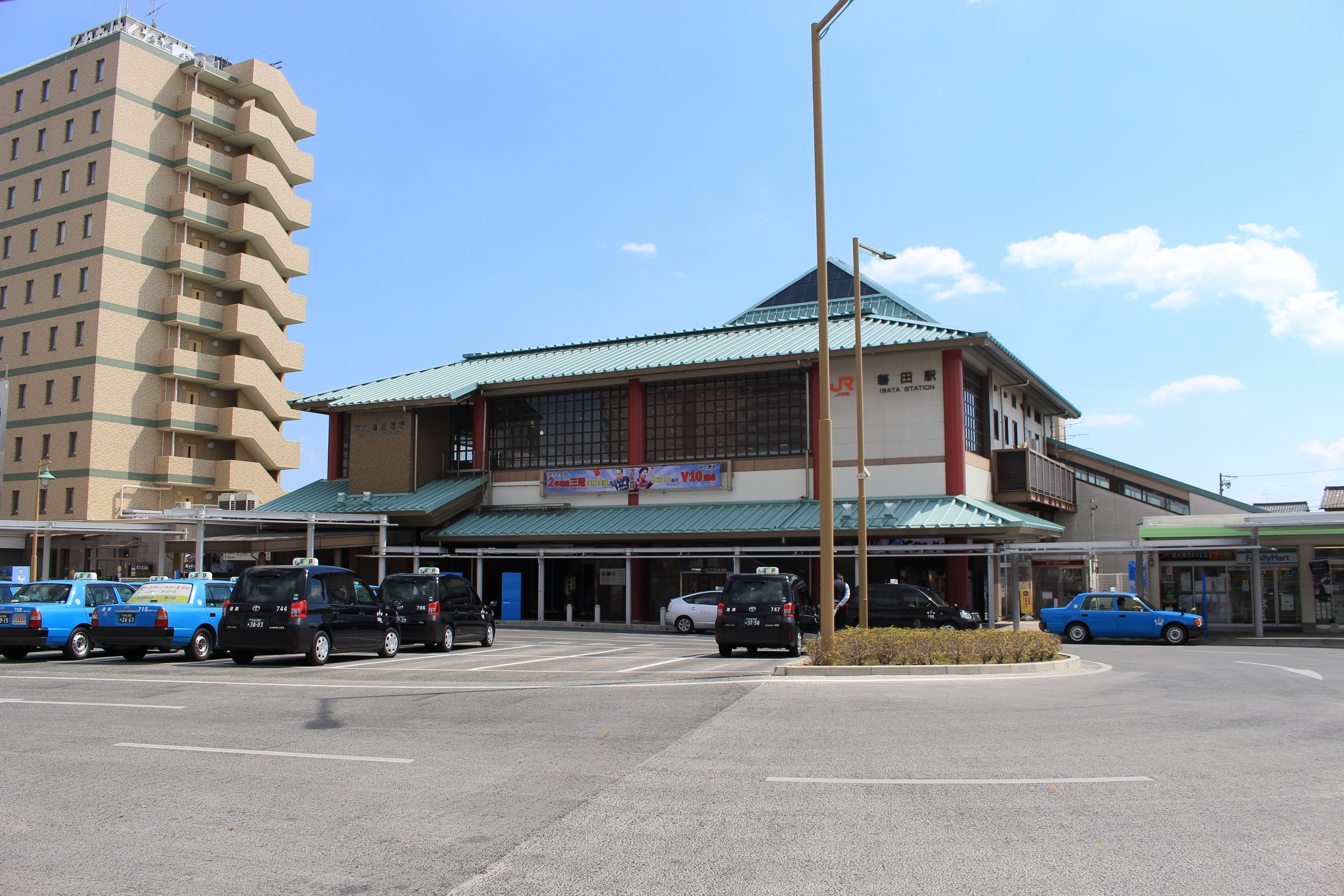 磐田駅北口